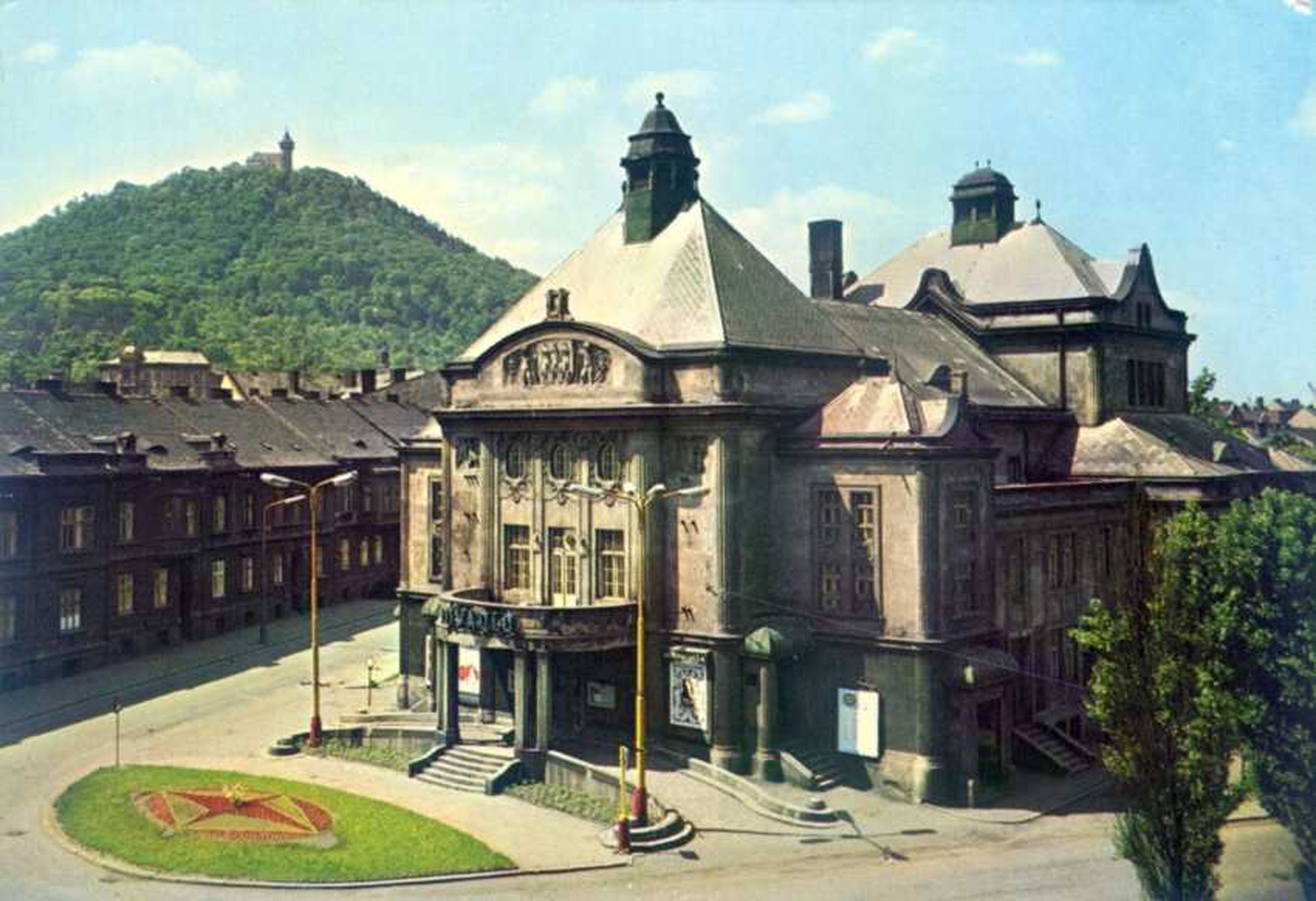 Staré divadlo v Mostě.